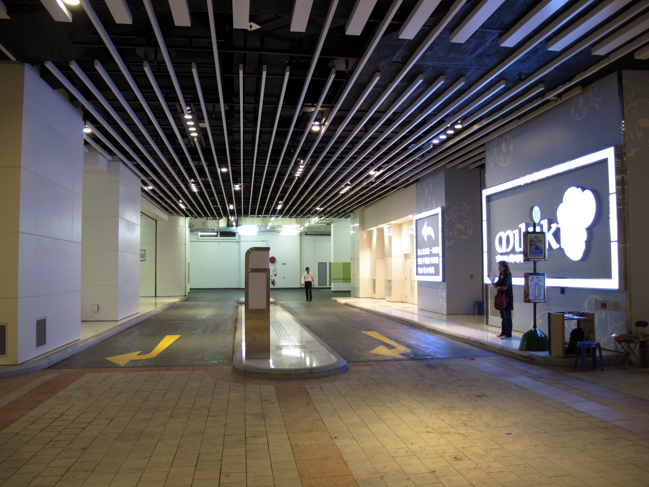 Mikiki MiniBus Stop